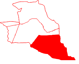 Ubicación de la parroquia San Antonio en el municipio Miranda, estado Zulia, Venezuela